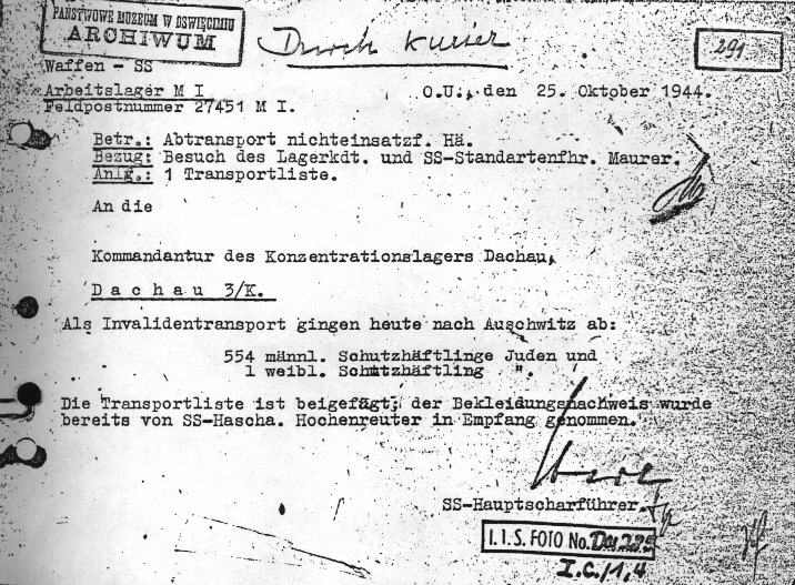 Notiz über den Transport von "Schutzhäftlingen" vom Lager Mühldorf nach Auschwitz